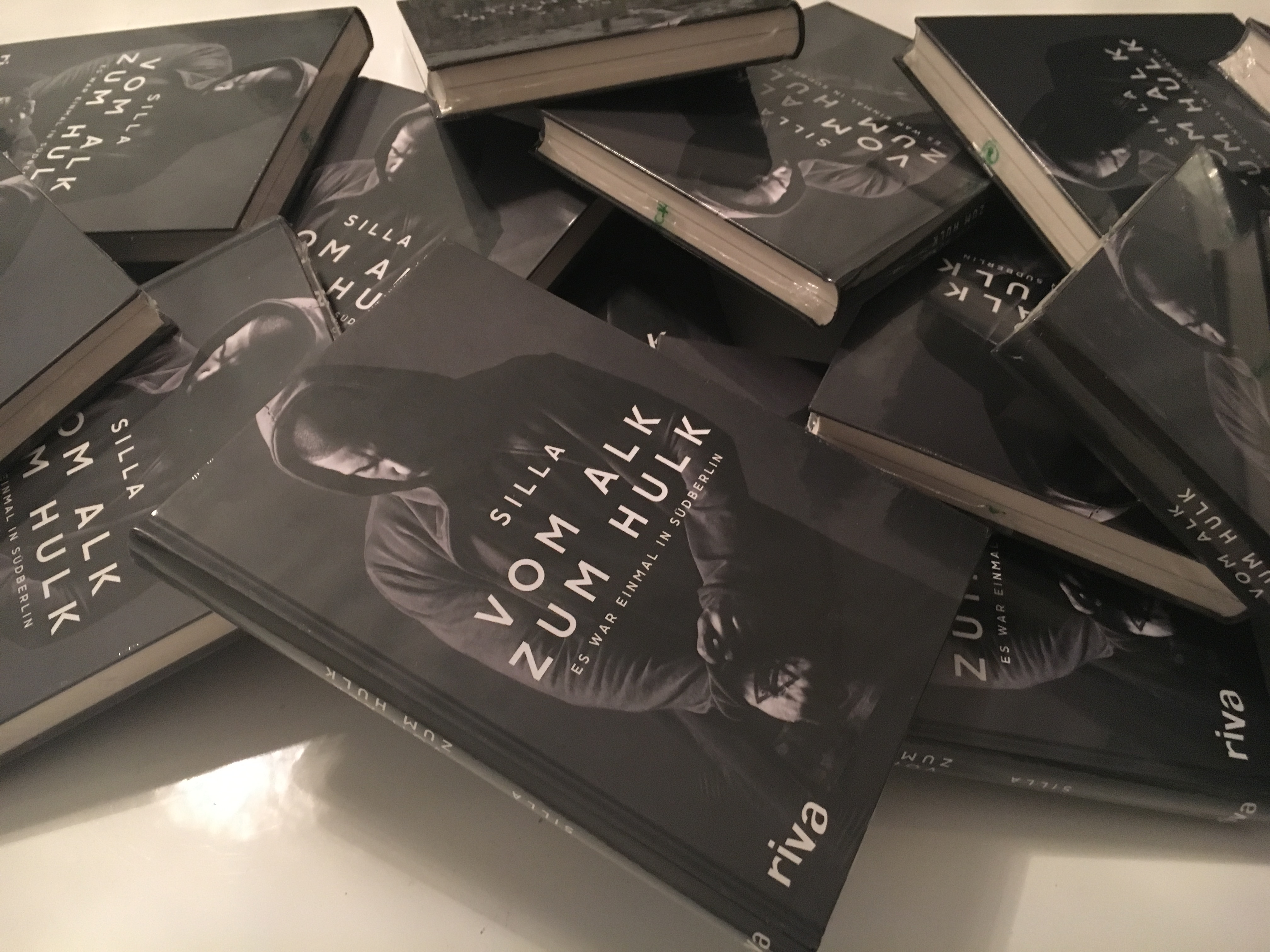 Sillas Autobiografie Vom Alk zum Hulk: Es war einmal in Südberlin Erscheinungsdatum – 12. September 2016 von Silla (Autor) Das Buch erzielte Platz 1 der Bestseller Liste in Pop-Literatur, Musik, Fernsehen und Theater. Klappentext: Die Fähigkeit zum Kampf wird im Kampf geboren und das Leben hat Silla zu einem Kämpfer gemacht. Aufgewachsen in Berlin-Tempelhof entdeckte er früh seine Leidenschaft für Rap. Im Berliner Untergrund wurde er von King Orgasmus One unter Vertrag genommen, schlug ein Angebot von Bushidos Label ersguterjunge aus und bewegte sich von da an im Dunstkreis von Aggro Berlin. Der Hype war da, doch der Druck war zu groß. Silla begann immer exzessiver zu trinken, bis er 2009 schließlich mit fast fünf Promille in ein Krankenhaus eingeliefert und wiederbelebt werden musste. Ein Wendepunkt. Er entschloss sich, seine Alkoholsucht zu bekämpfen, schloss sich dem frisch gegründeten Label Maskulin an, machte einen Entzug und entdeckte den Sport als seine ”Ersatzdroge“. Silla verwandelte sich in eine Fitnessikone und stürmte die Charts. In seiner Autobiografie erzählt er von seinem Weg, beleuchtet, was hinter den Kulissen der Deutschrapszene passiert, berichtet von seinem Kampf gegen den Alkohol, von der Erlösung durch den Sport. Eine fesselnde Geschichte von Erfolg, Misserfolg, Absturz und Wiedergeburt.